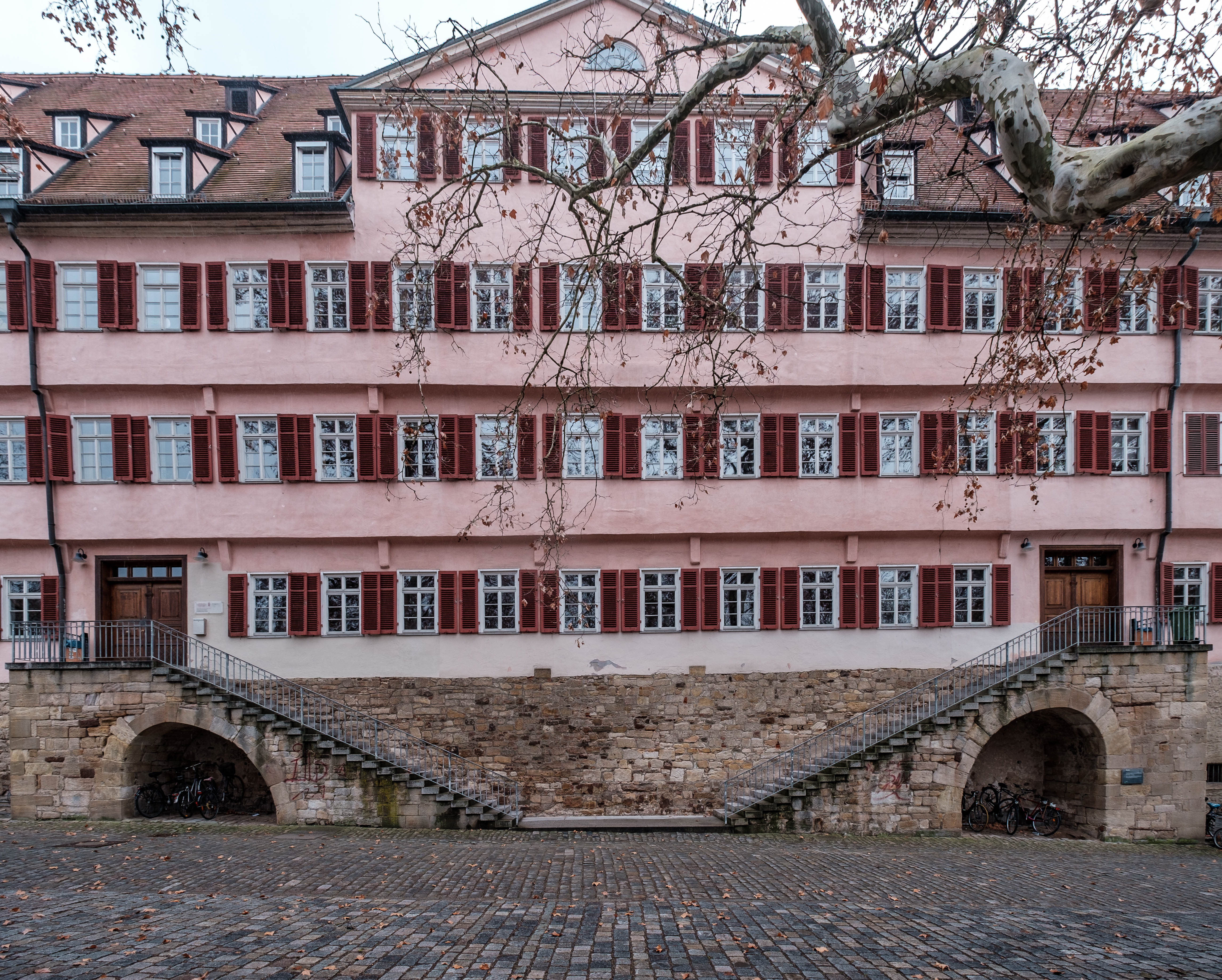 Alte Burse in Tübingen